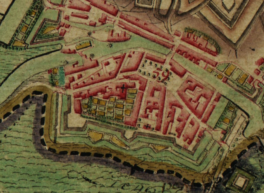 Charleroi : ville-basse sur la carte de Ferraris. Carte de Cabinet des Pays-Bas autrichiens La carte de Cabinet des Pays-Bas autrichiens a été levée sous la direction du comte de Ferraris entre 1770 et 1777. Il s'agit d'un document militaire réalisé en trois exemplaires et dont l'échelle originale est 1 / 11 520. La carte est entièrement manuscrite et procède de levers sur le terrain.